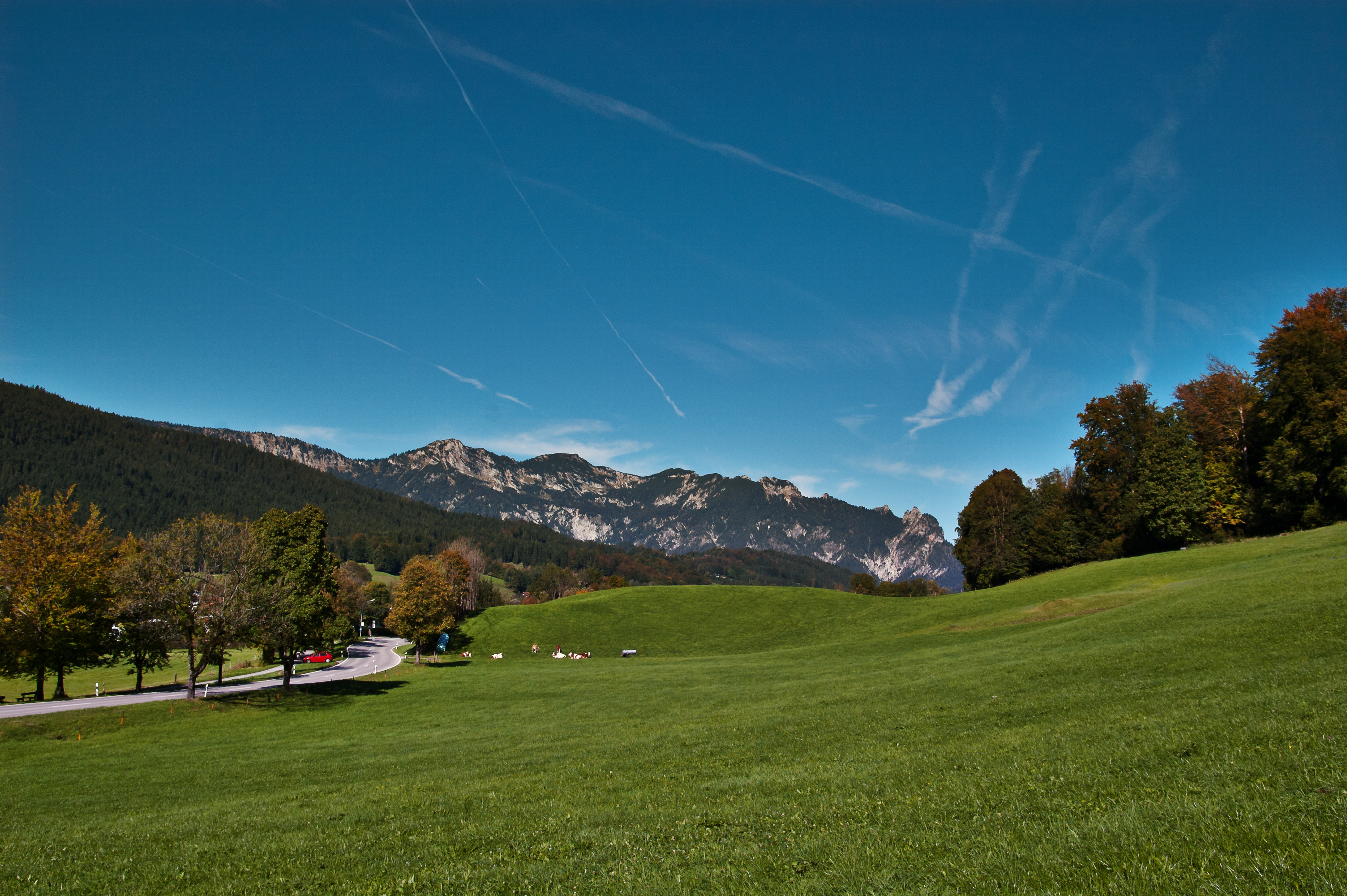 Blick von Stangaß aus auf das Lattengebirge